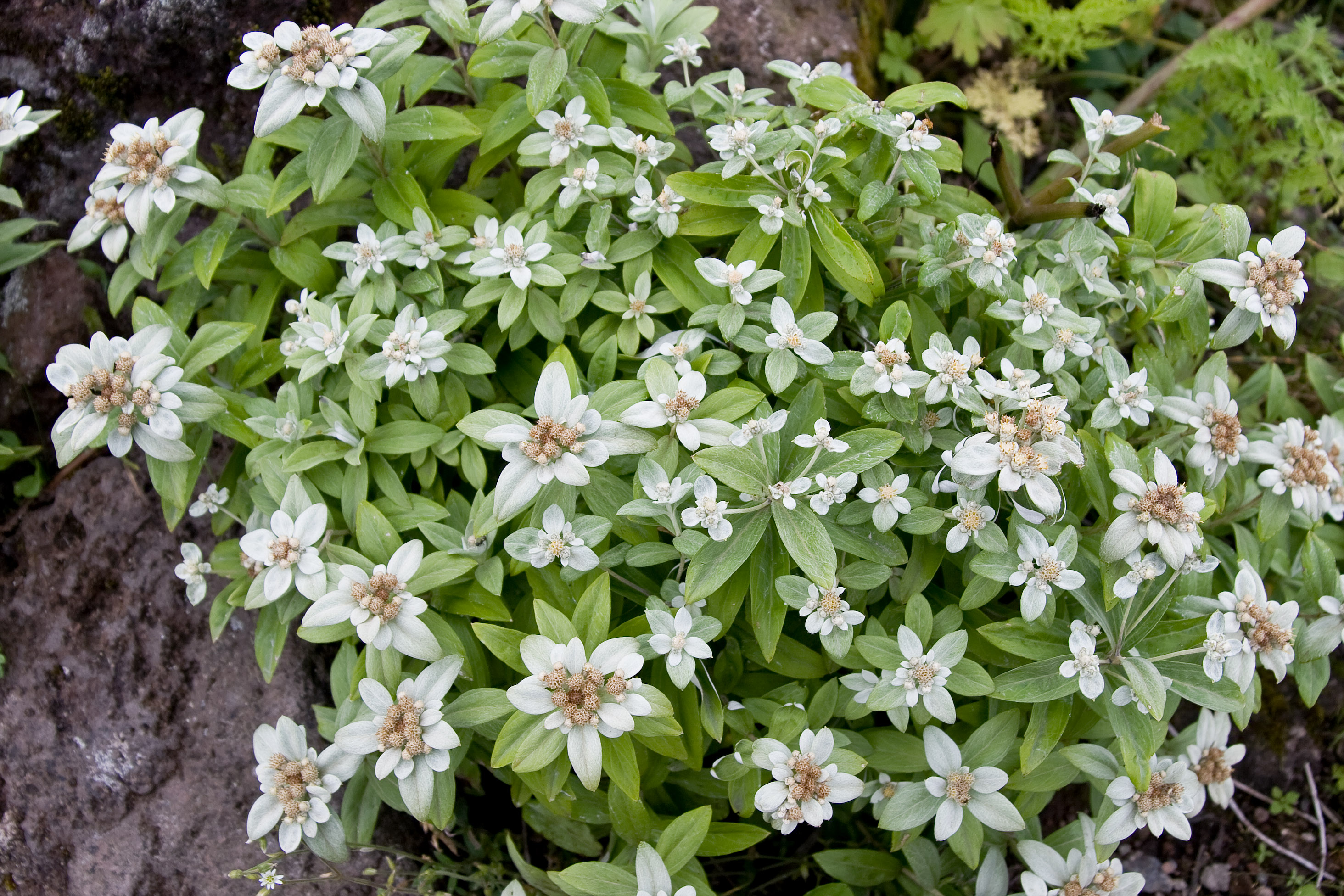 ウスユキソウ (学名:Leontopodium japonicum)